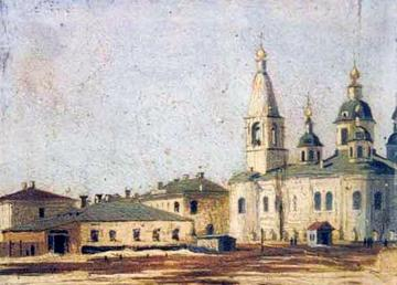 Василий Алексеевич Волков (1840-1907) — русский и украинский живописец. "Сретенская церковь в Полтаве"